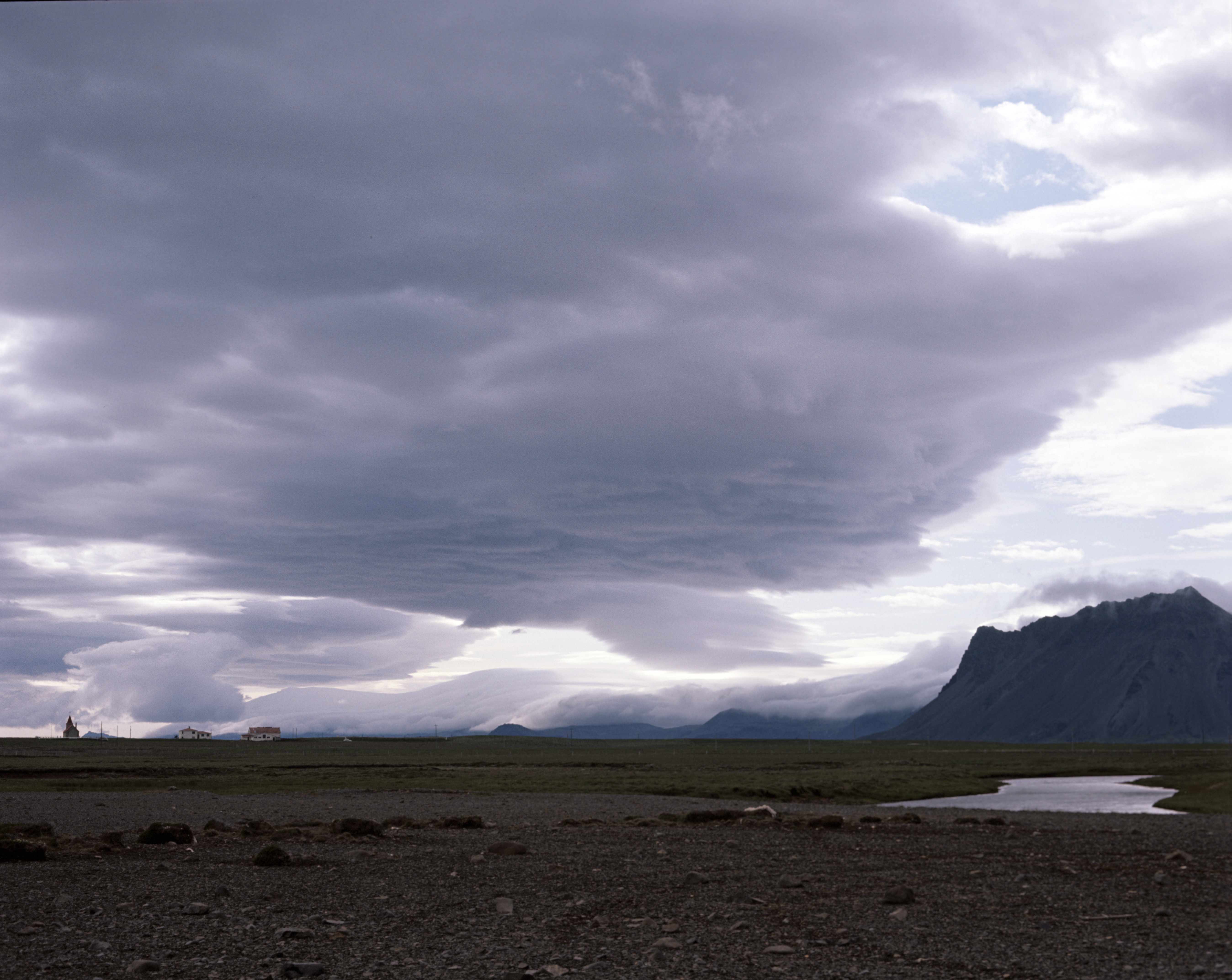 Rechts Snæfelsnes, links die Kirche Fáskruðabakki